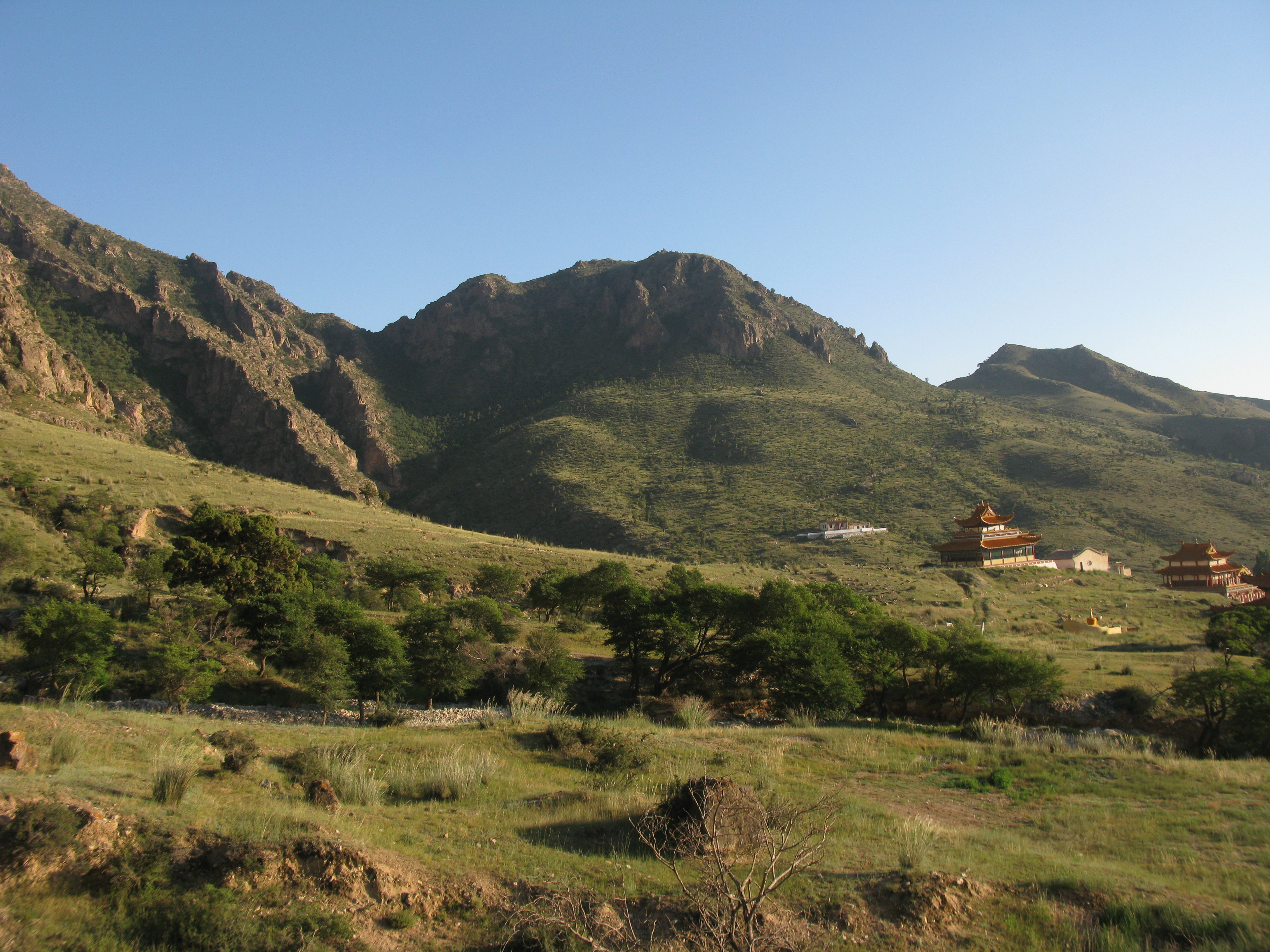 Lost temples